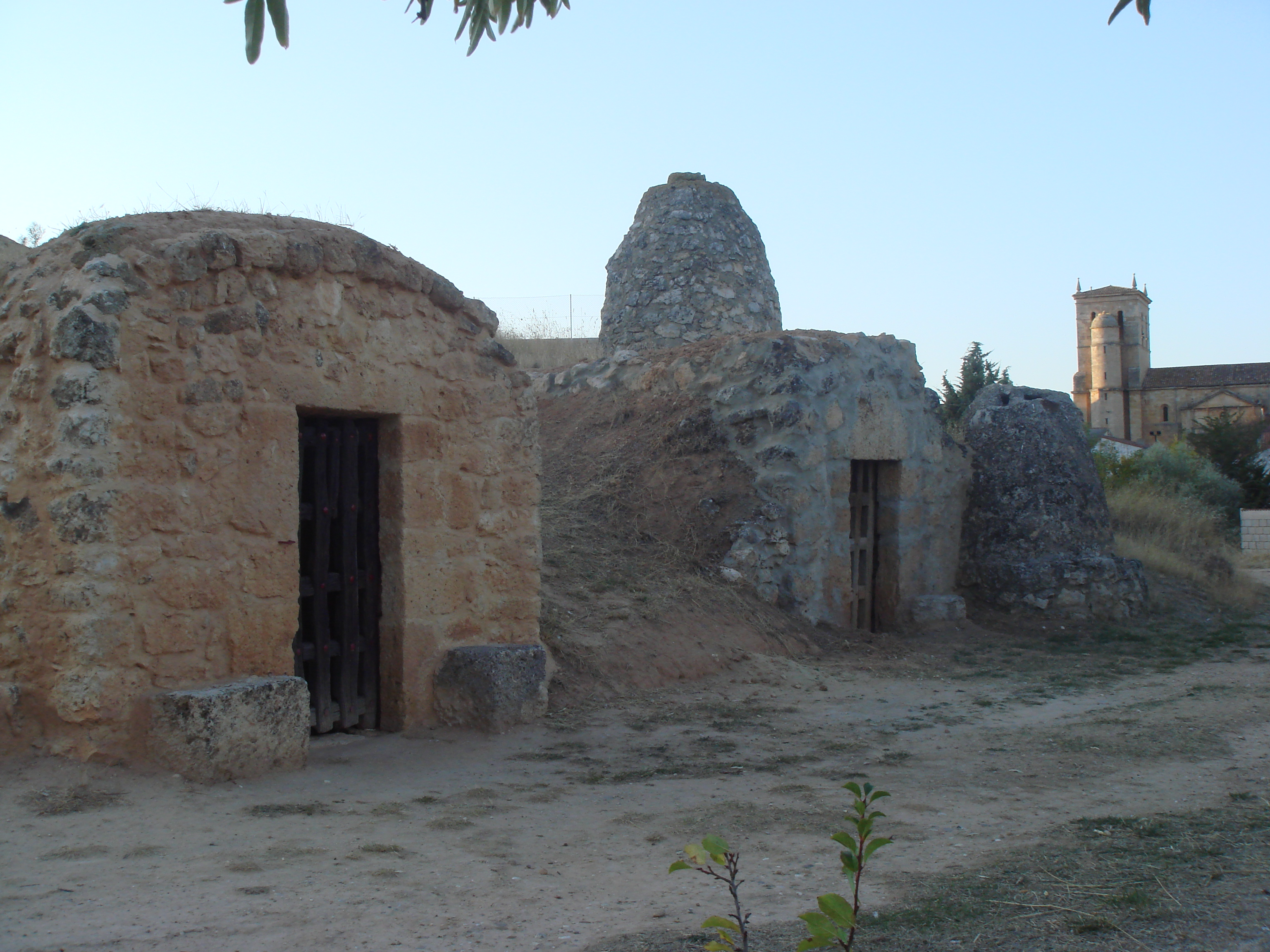 Bodegas típicas de San Martín de Rubiales (Burgos, España)